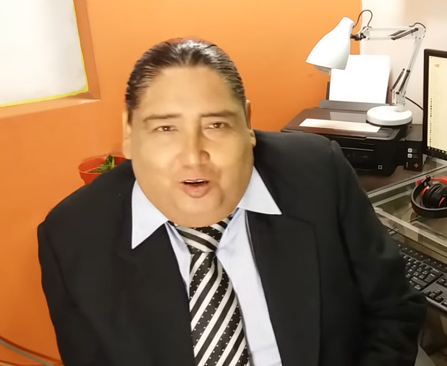 Imagen de tongo